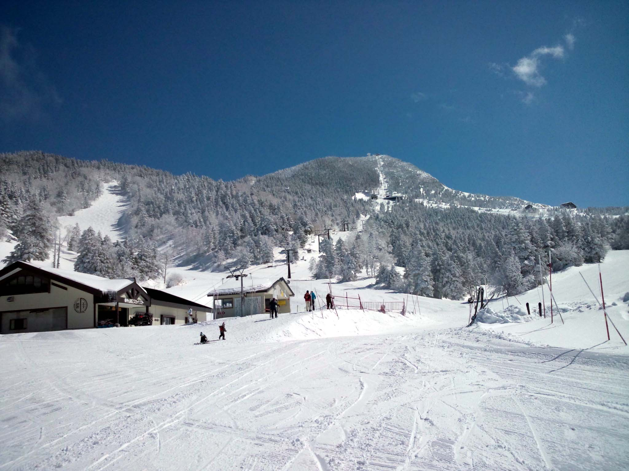 横手山･渋峠スキー場から横手山を望む。